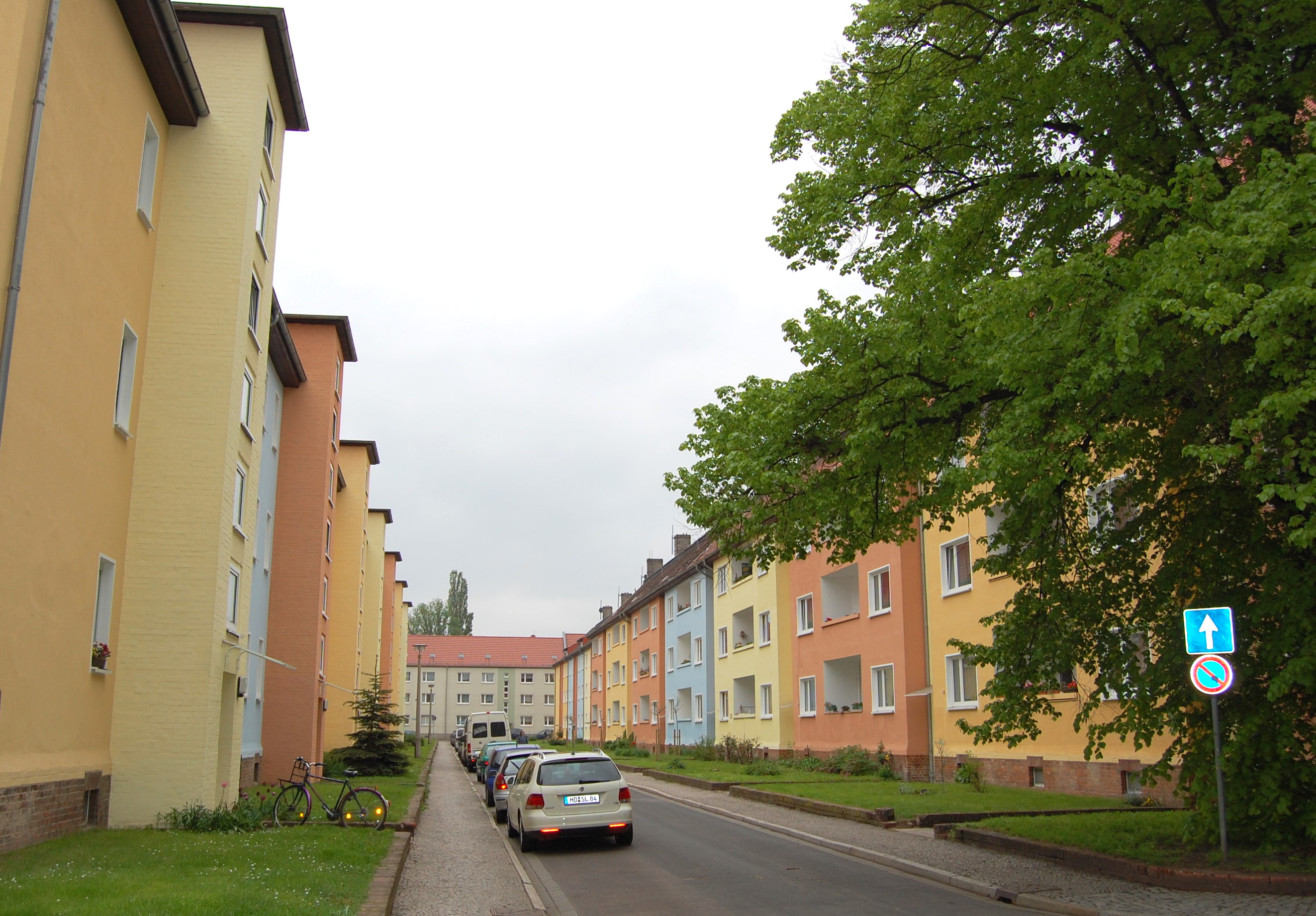 Straße Am Klosterfeld Magdeburg-Fermersleben